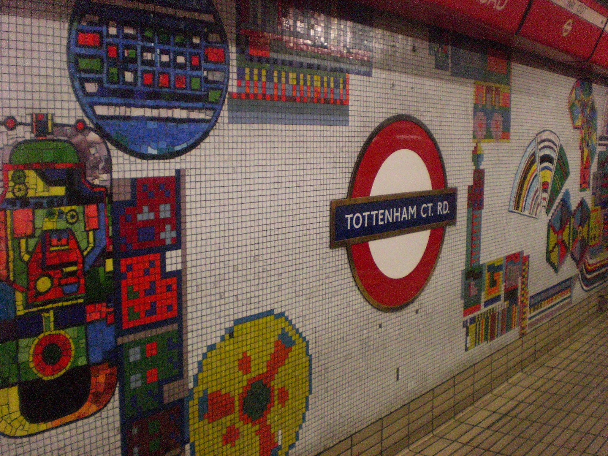 Station du métro de Londres : Tottenham Court Road.